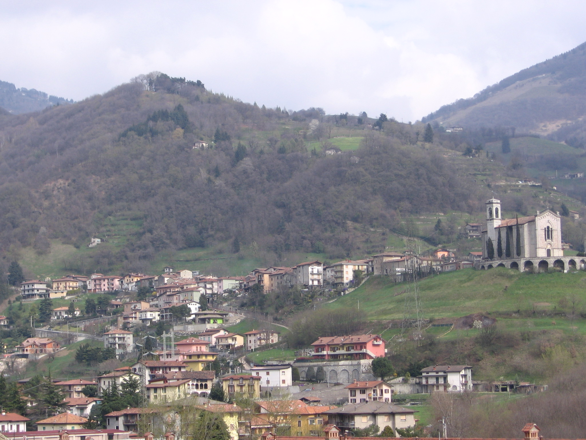 Grone, Bergamo, Italia